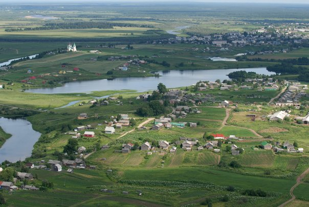 Село Матигоры с высоты птичьего полета